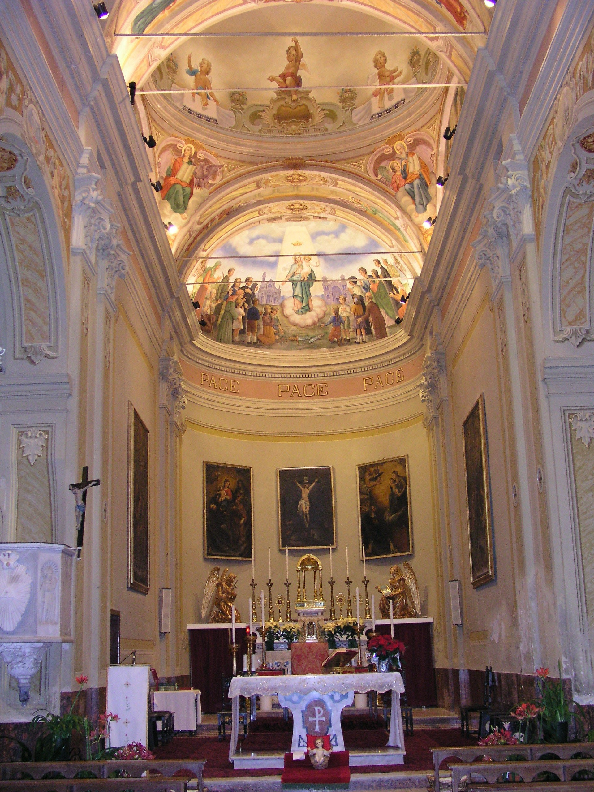 Interno del Santuario: Navata Centrale